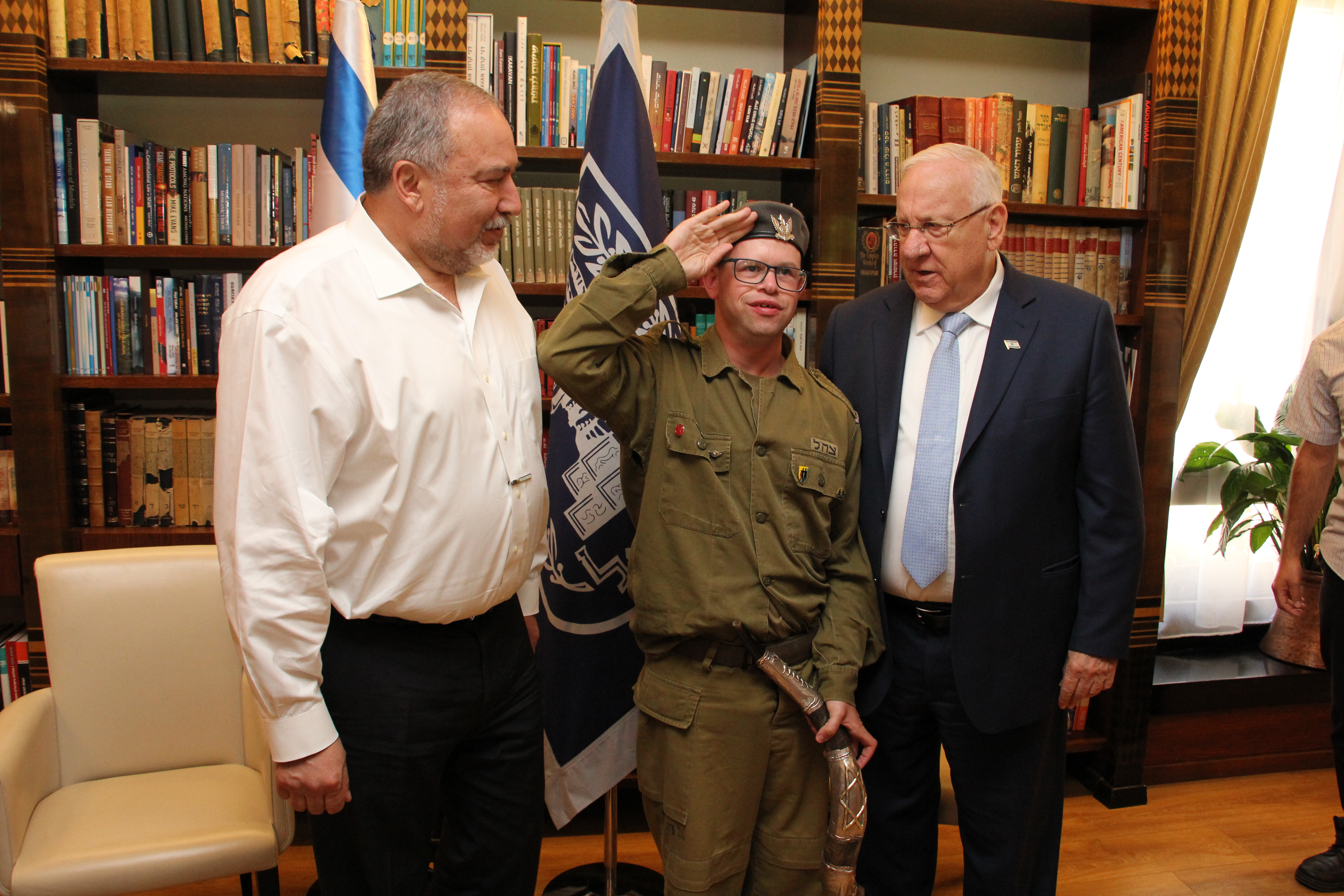 נשיא המדינה מר רובי ריבלין ושר הביטחון מר אביגדור ליברמן שומעים תקיעת שופר מחייל בתכנית גדולים במדים